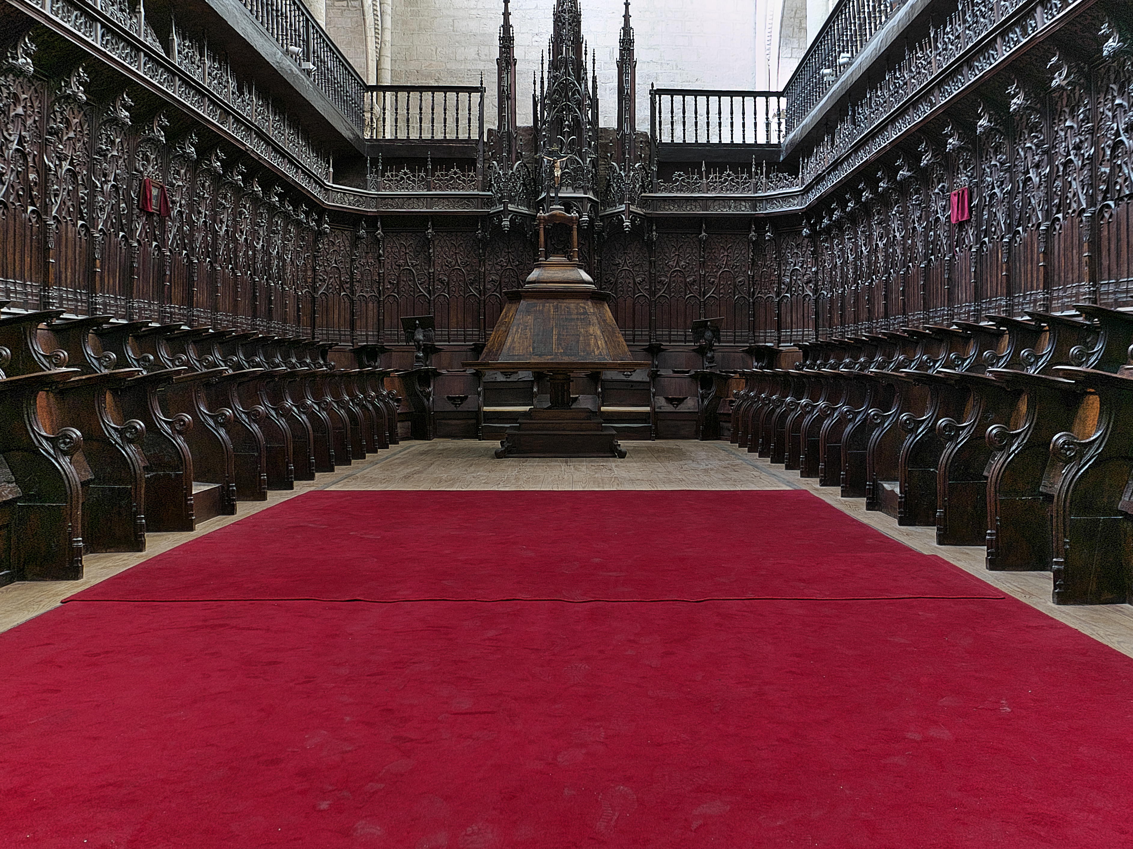 Coro plateresco de Esteban Obray (1505-1520), nogal teñido y encerado.